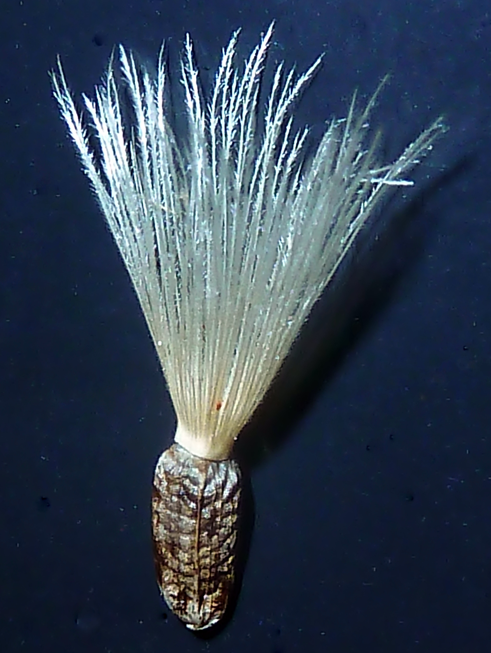 Onopordum nervosum (Cardo gigante) - Cipsela suelta con su vilano de pelos subplumosos/escabridos. - Carretera nacional N301, km209,250, Paraje el Carril de la Longaniza, circa La Roda (Albacete, España).